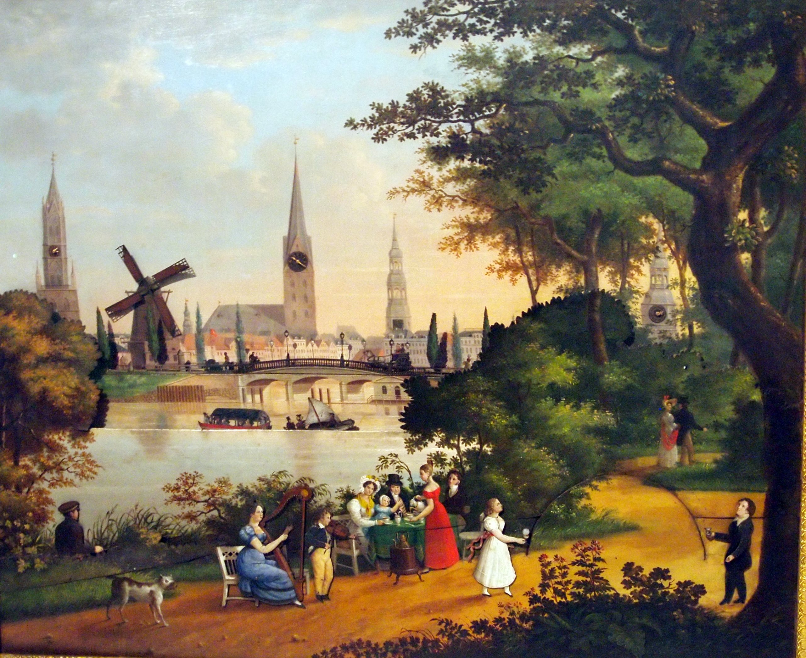 Biedermeierbild, Uhrenbild mit Spielwerk und Bewegungsautomaten, mit drei Uhrwerken bzw. Spielwerken und damit beweglichen Teilen; von links: St. Jacobi, St. Petri, St. Katharinen and St. Nikolai